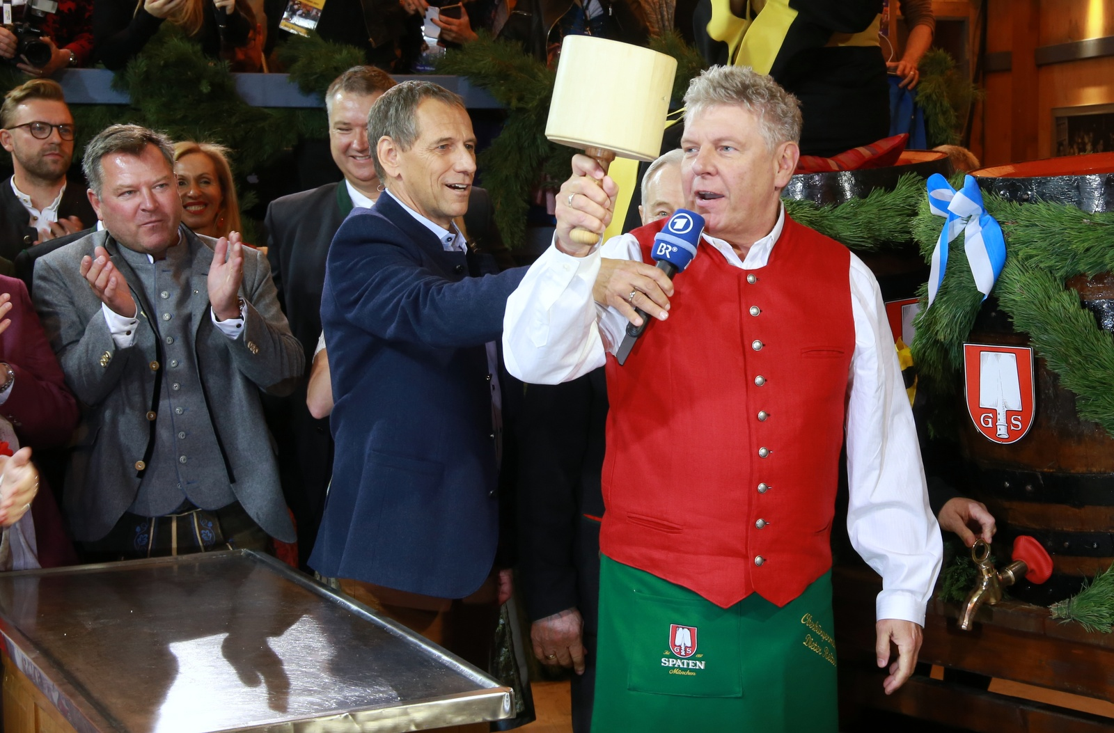 "Ozapft is', auf eine friedliche Wiesn": der Münchner Oberbürgermeister am 16.09.2017 unmittelbar nach dem Anzapfen auf der Wiesn. Damit ist das Okotberfest 2017 eröffnet. Links: Münchens 2. Bürgermeister Josef Schmid. Titel des Werks: "Ozapft is': Münchens OB Dieter Reiter (2017)"